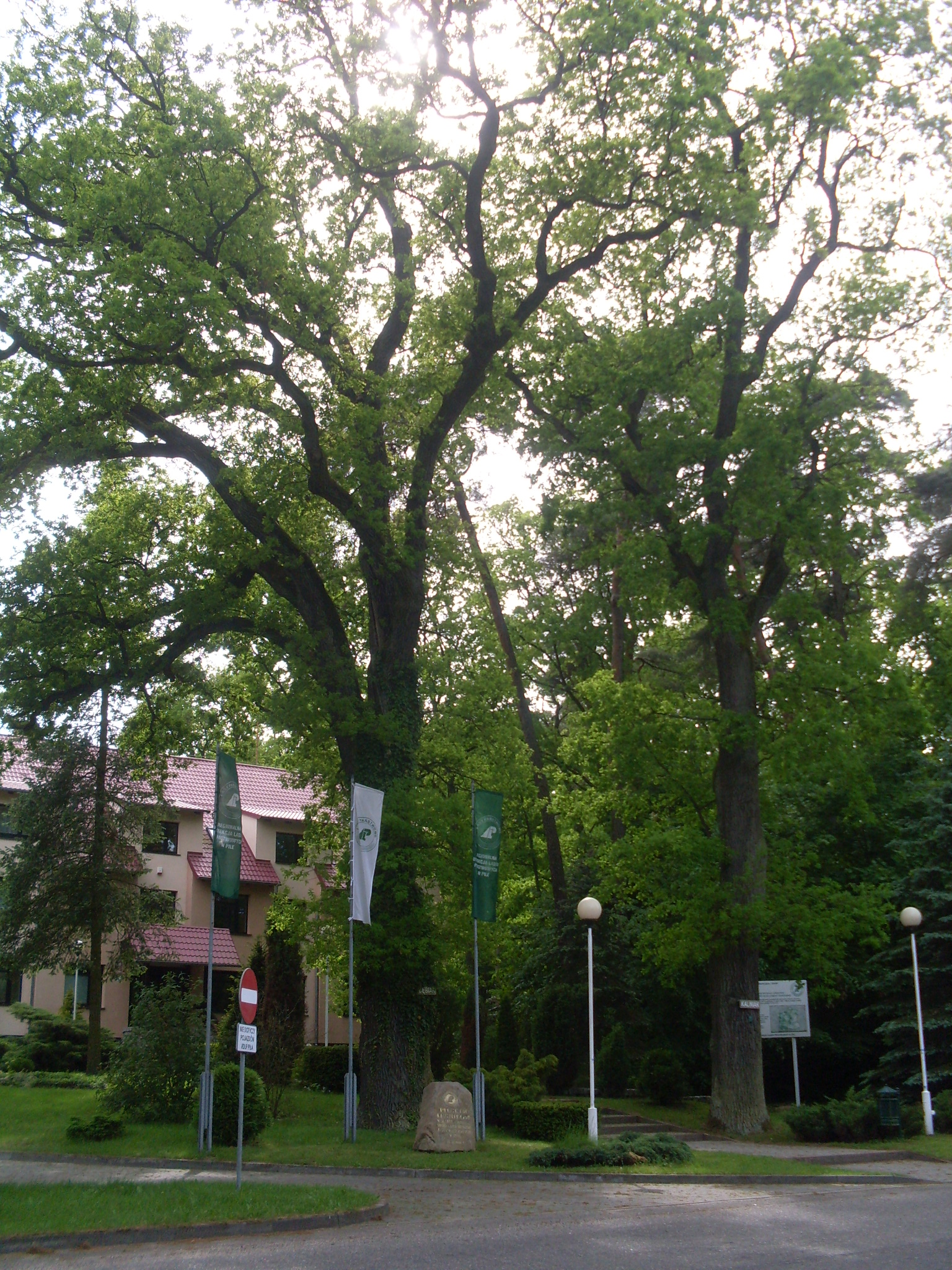 Dęby Kaliniak i Dębiak będące pomnikami przyrody przed siedzibą Regionalnej Dyrekcji Lasów Państwowych w Pile.